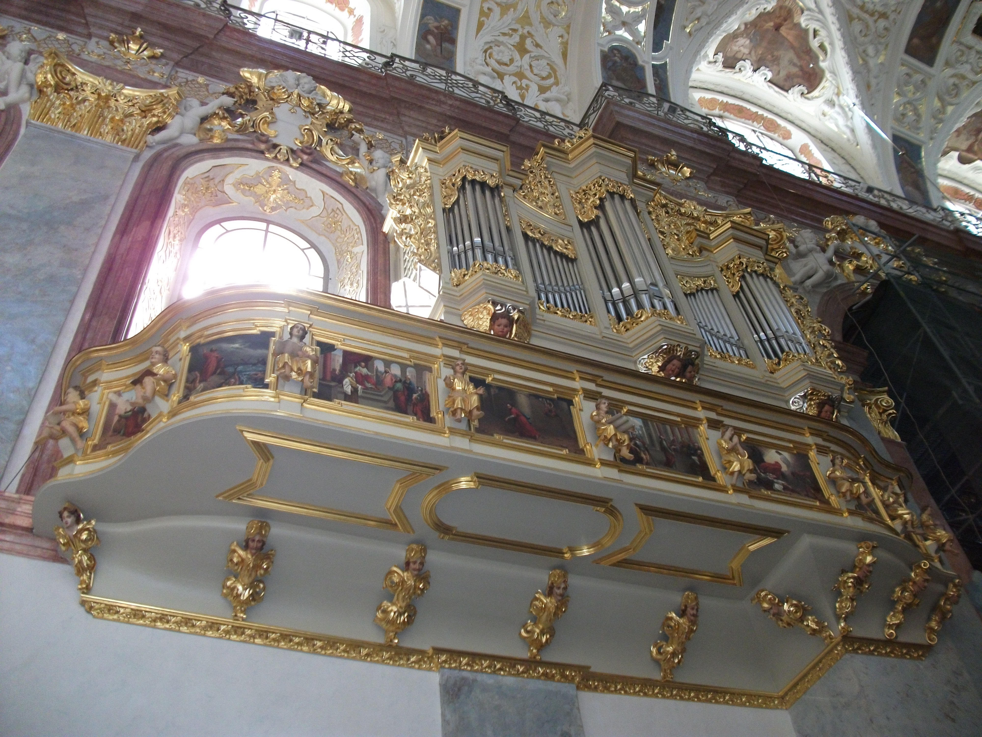 Odnowiony boczny prospekt organowy w jasnogórskiej bazylice w Częstochowie